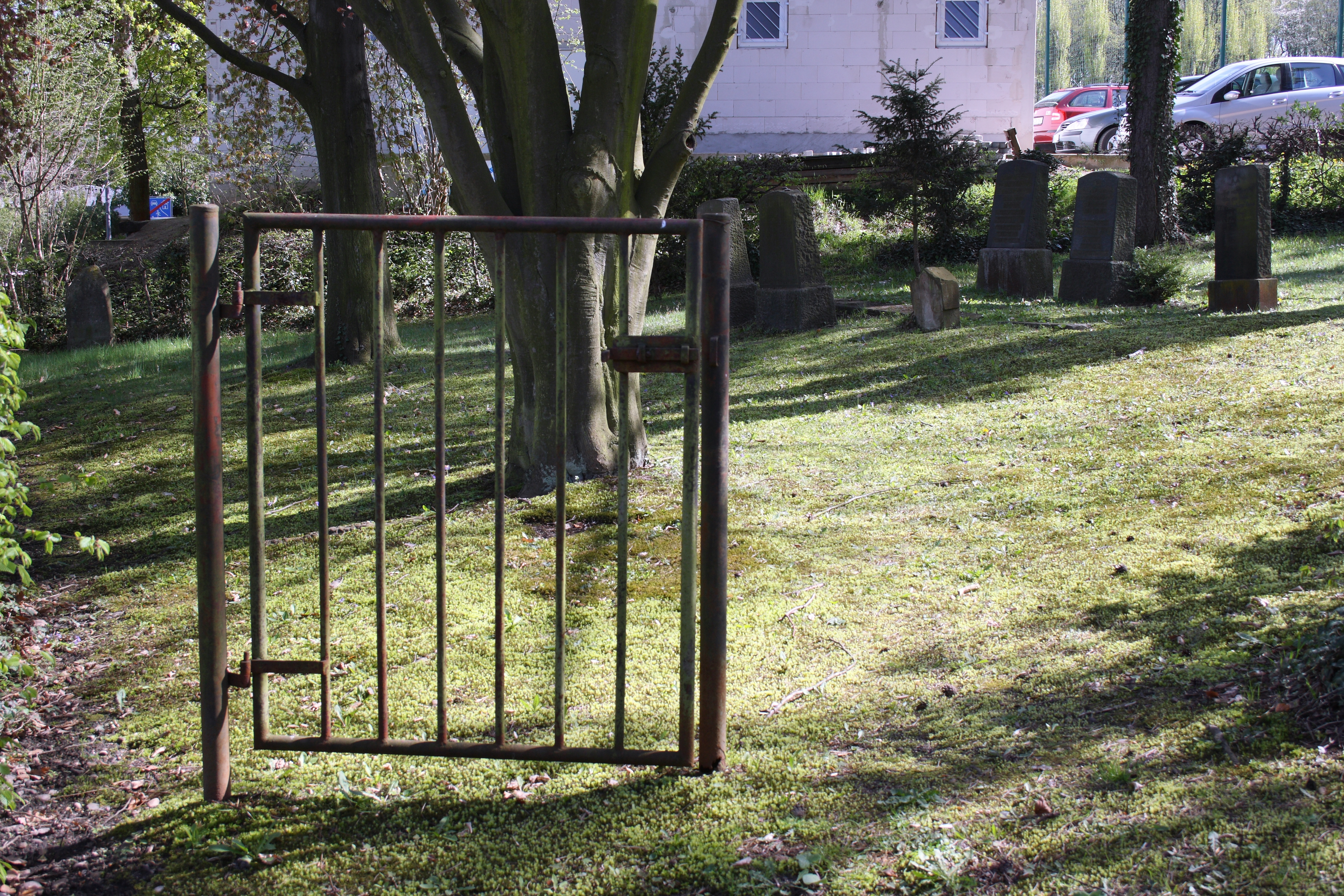 jüdischer Friedhof in Walberberg, Stadtteil von Bornheim